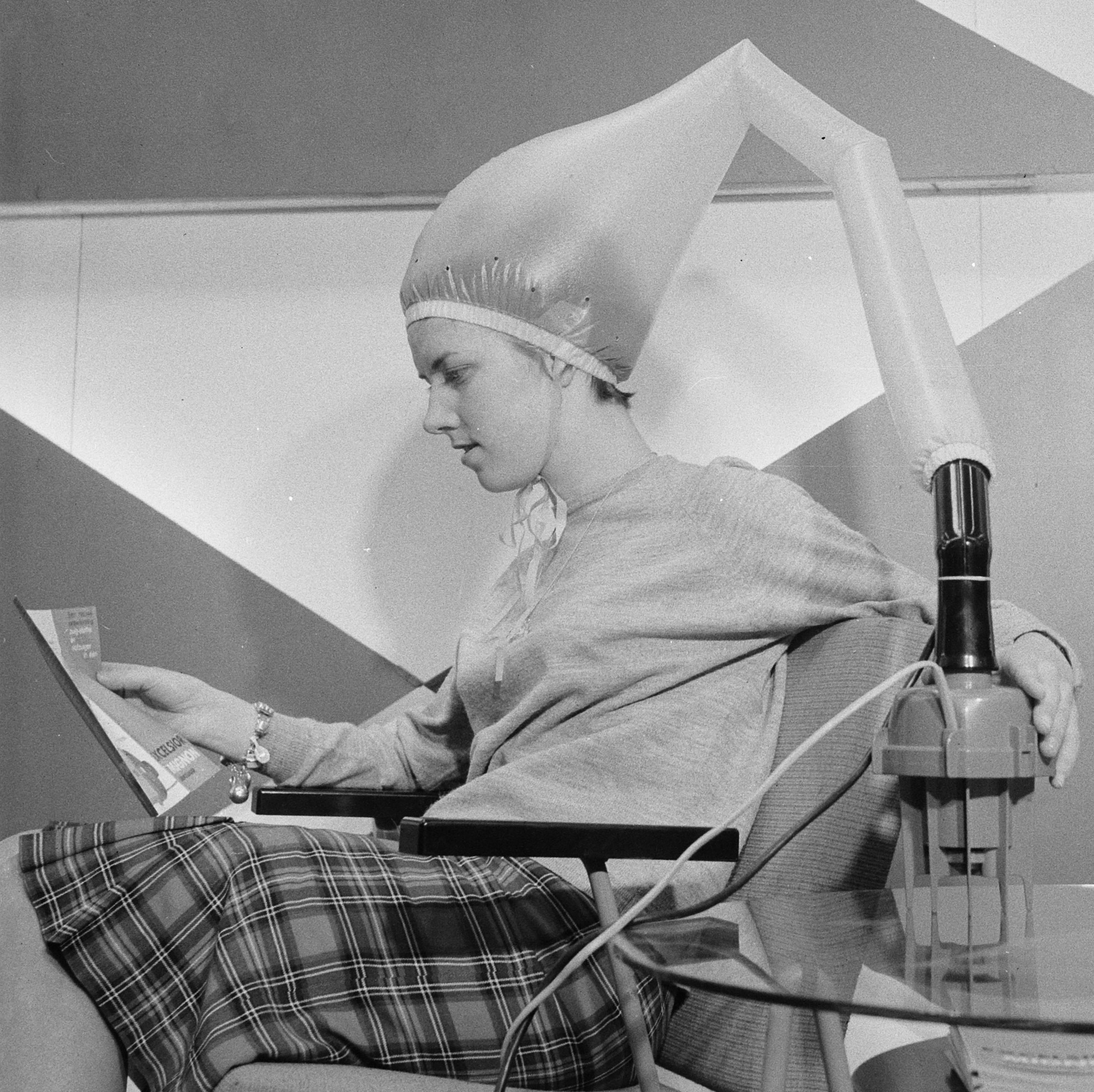 Huishoudbeurs in RAI Amsterdam geopend Excelsior stofzuiger als haardroger